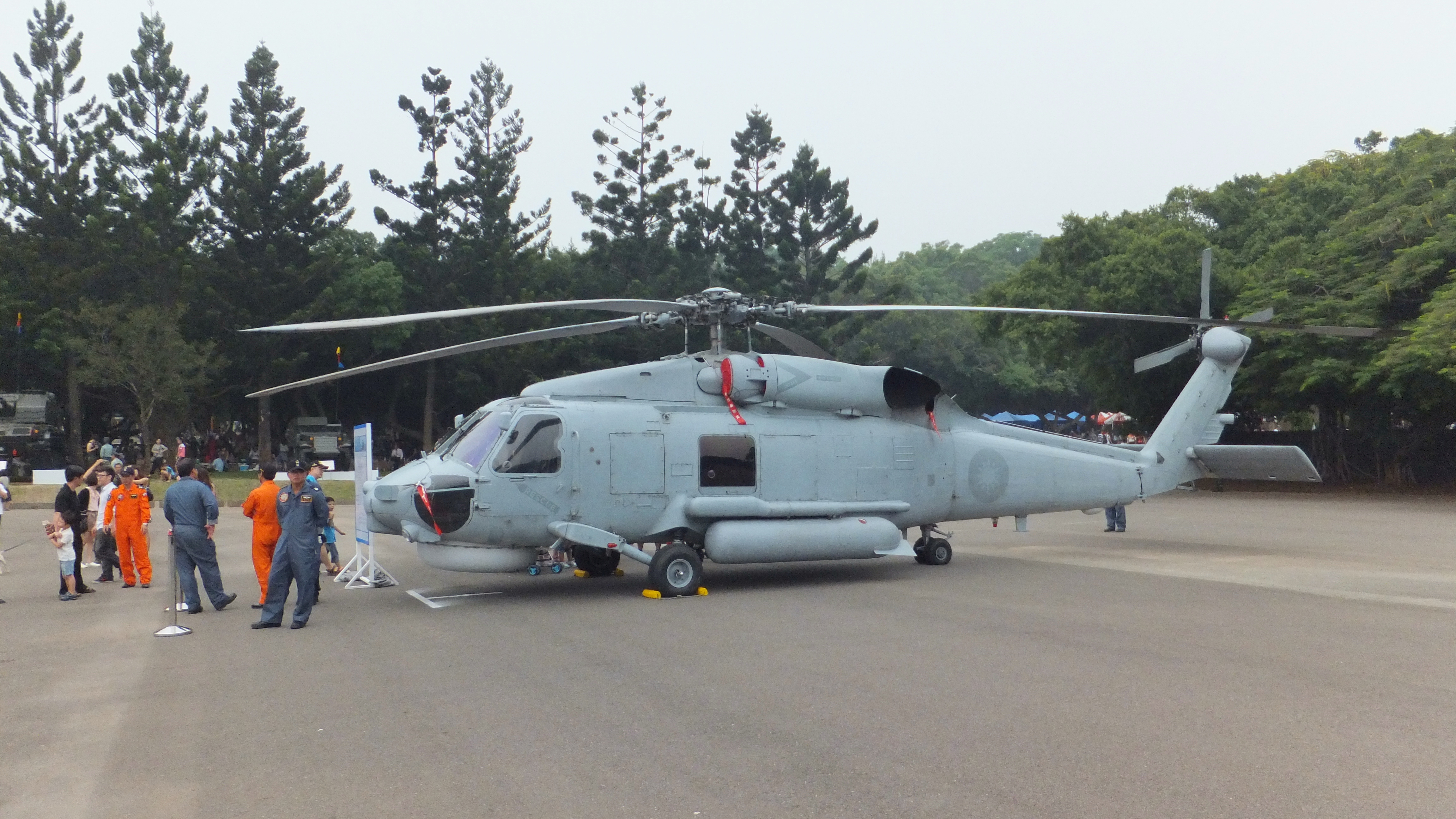 中華民國海軍S-70C(M)反潛直昇機，攝於2011年成功嶺營區開放活動。